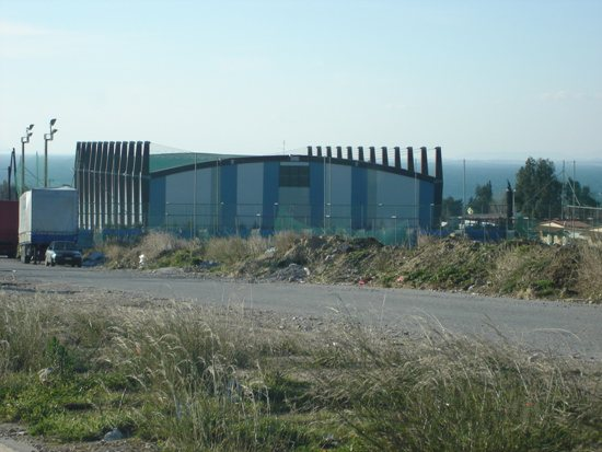 Nasional Idoor Hall Patras " olympic metalist Dimitris Tofalos" training hall Greece Παλαί ντε σπορ Πάτρας "Ολυμπιονίκης Δημήτριος Τόφαλος" βοηθητικό γυμναστήριο .